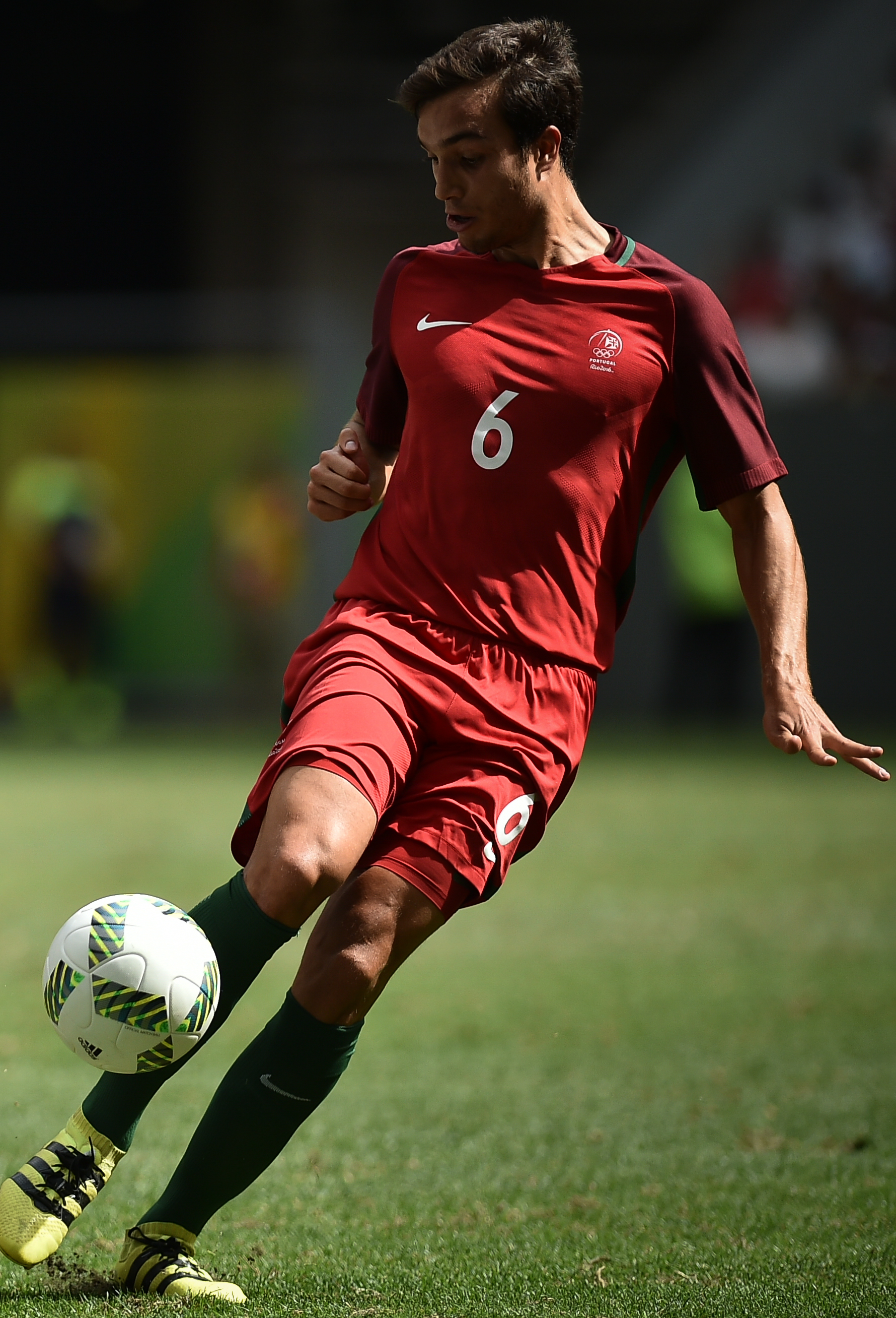 Estádio Nacional de Brasília Mané Garrincha, Brasília, DF, Brasil, 13/8/2016 Foto: Andre Borges/Agência Brasília Portigal e Alemanha jogam neste sábado (12), no Estádio Mané Garrincha, pelas quartas de final do futebol masculino nas Olimpíadas 2016.